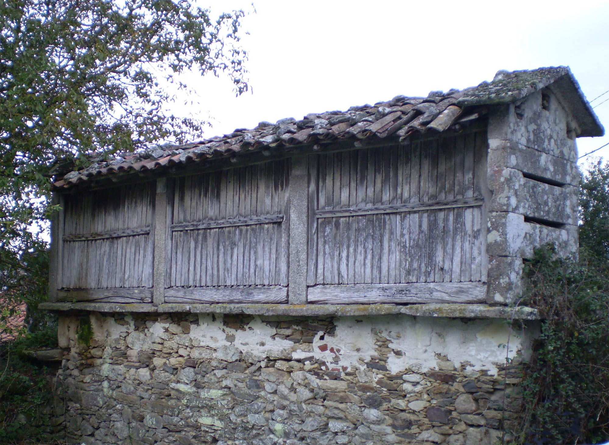 Hórreo tipo mahía, sobre solaina de mampostería, sen outra elevación. Cuberta de tella do país. Ubicado no lugar de Randulfe (Antas de Ulla)